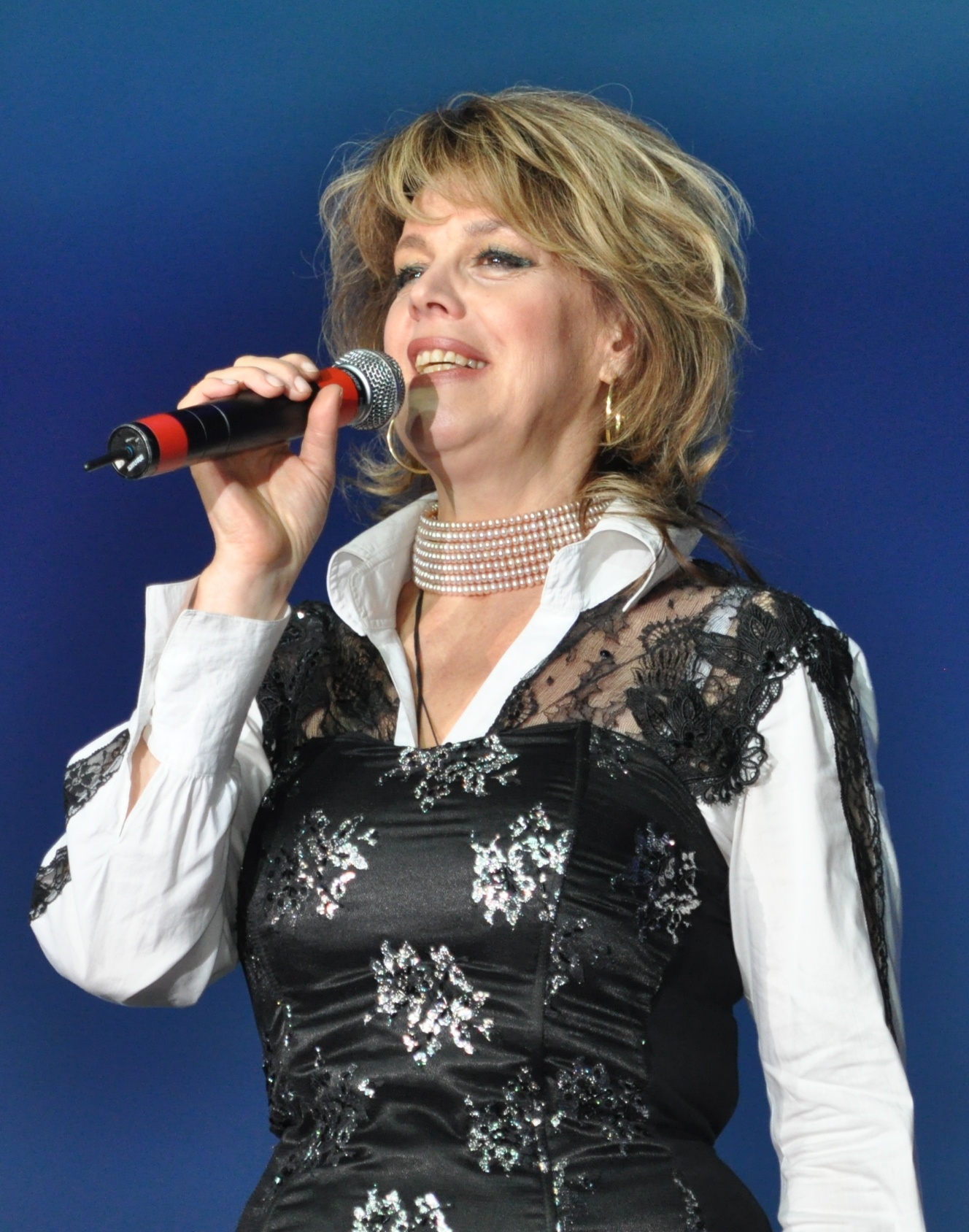 Оперная певица Любовь Казарновская во время выступления